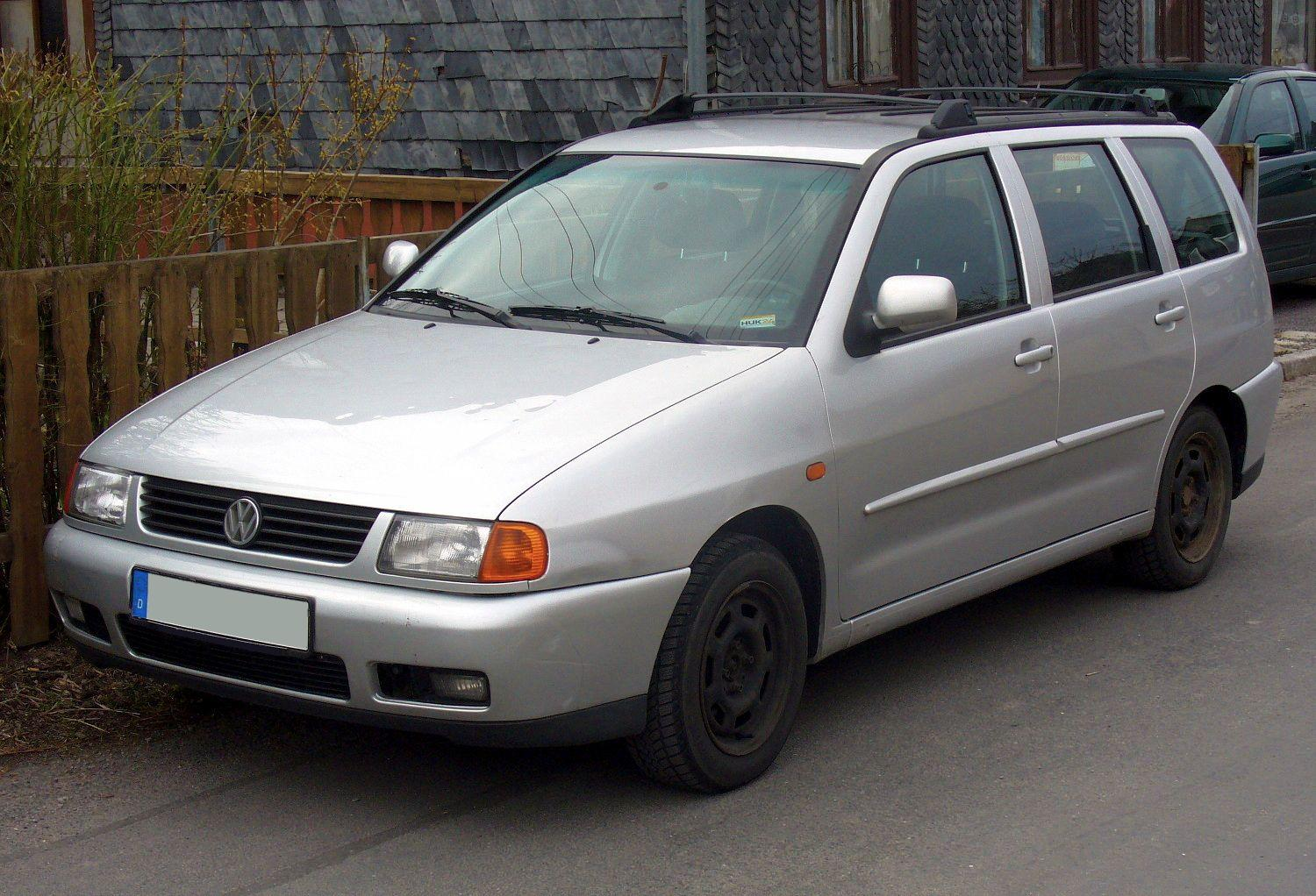 VW Polo III